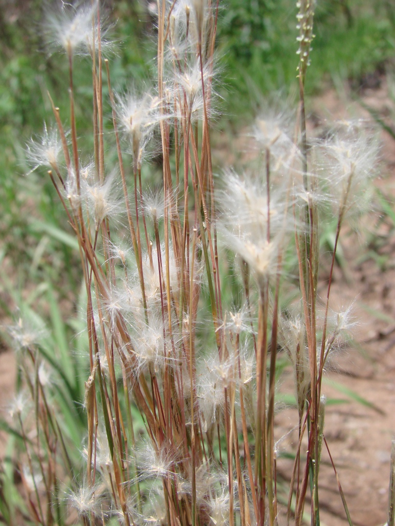 Andropogon leucostachyus Kunth - POACEAE - Jardim Botânico de Brasília - Brasília - Distrito Federal - Brasil.